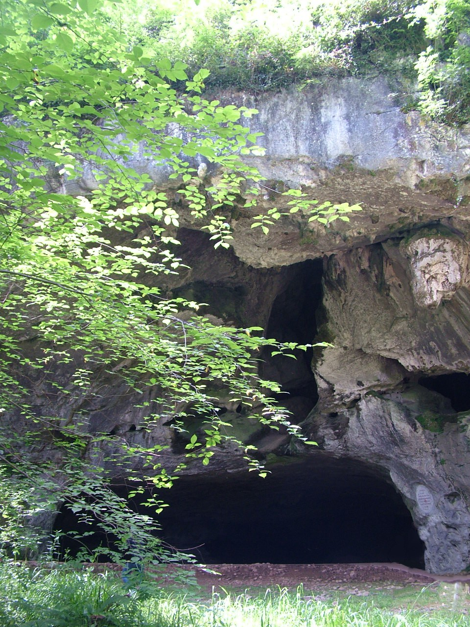 Entrée de la grotte de Sare